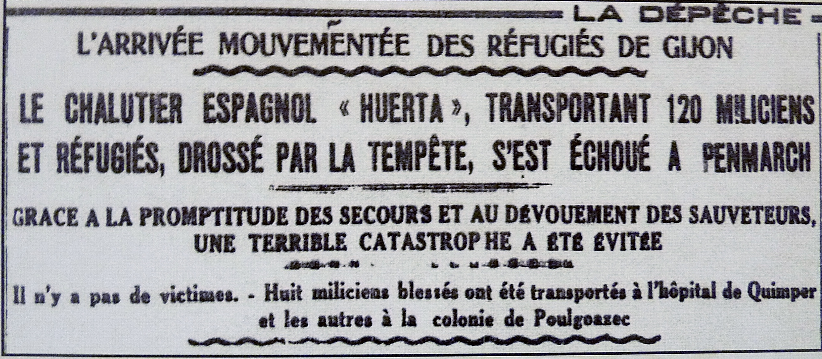 Un des titres du journal "La Dépêche de Brest et de l'Ouest" à propos du sauvetage des 120 réfugiés républicains espagnols qui étaient à bord du chalutier Huerta victime de la tempête près de Penmarch le 23 octobre 1937.